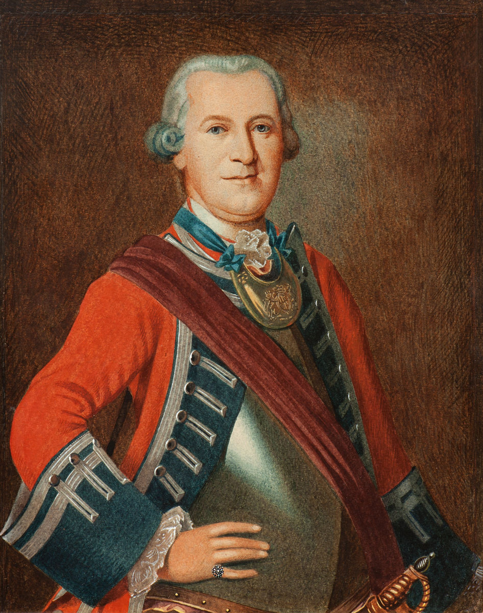 Porträt Georg Adam Gmelin. Gouache auf Karton. Verso ein handschriftlicher Stammbaum mit den Lebensdaten des Dargestellten. 34,2, x 26,7 cm. Kopie des 19. Jahrhunderts nach einem durch eine Kopie überlieferten und während des Zweiten Weltkrieges zerstörten Originalgemälde. Provenienz: Nachlass Blankenhorn, Badenweiler.